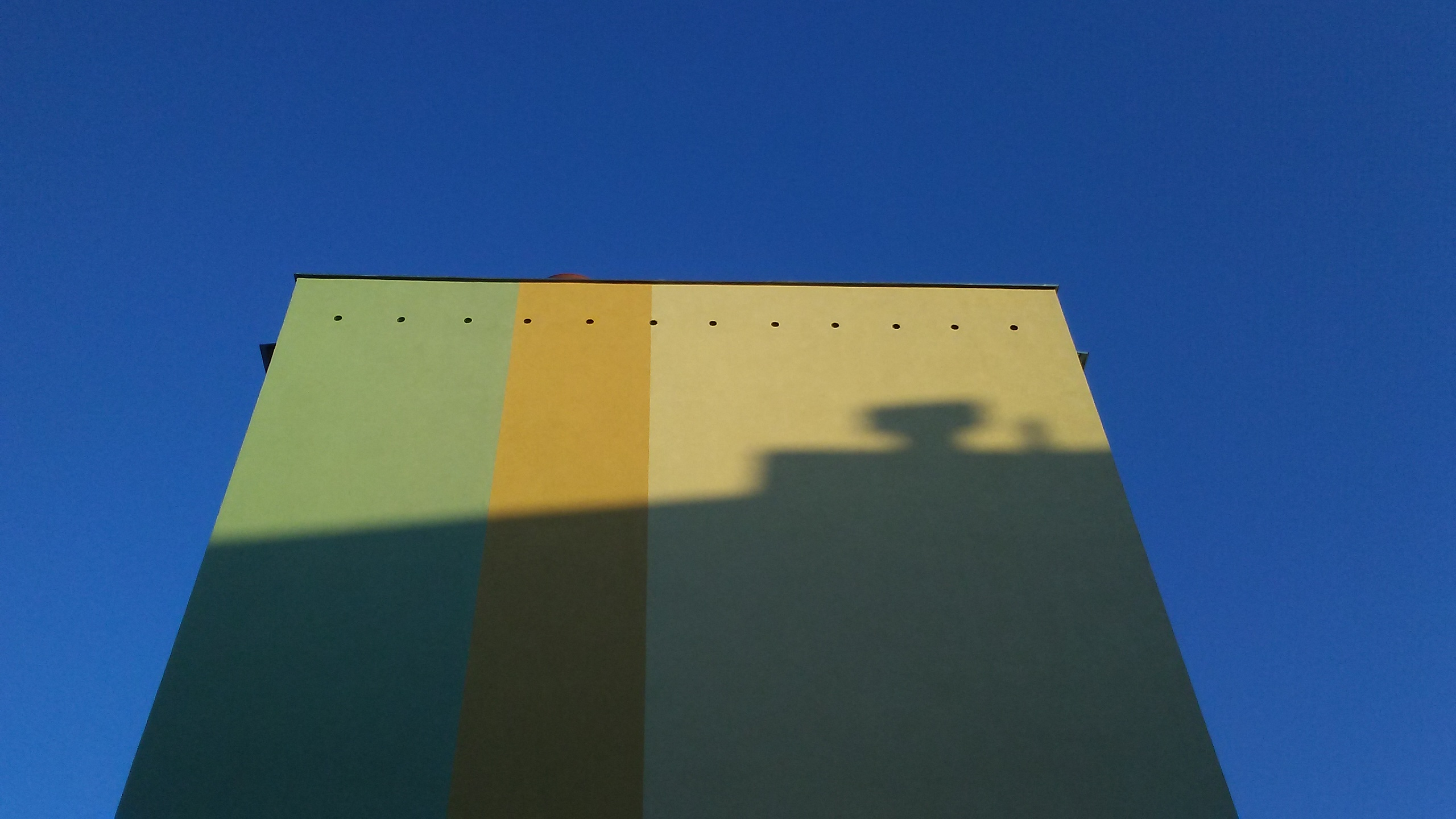 Otory dla jerzyków w fasadzie bloku mieszkalnego, Tomaszów Mazowiecki, ulica Sikorskiego 4A